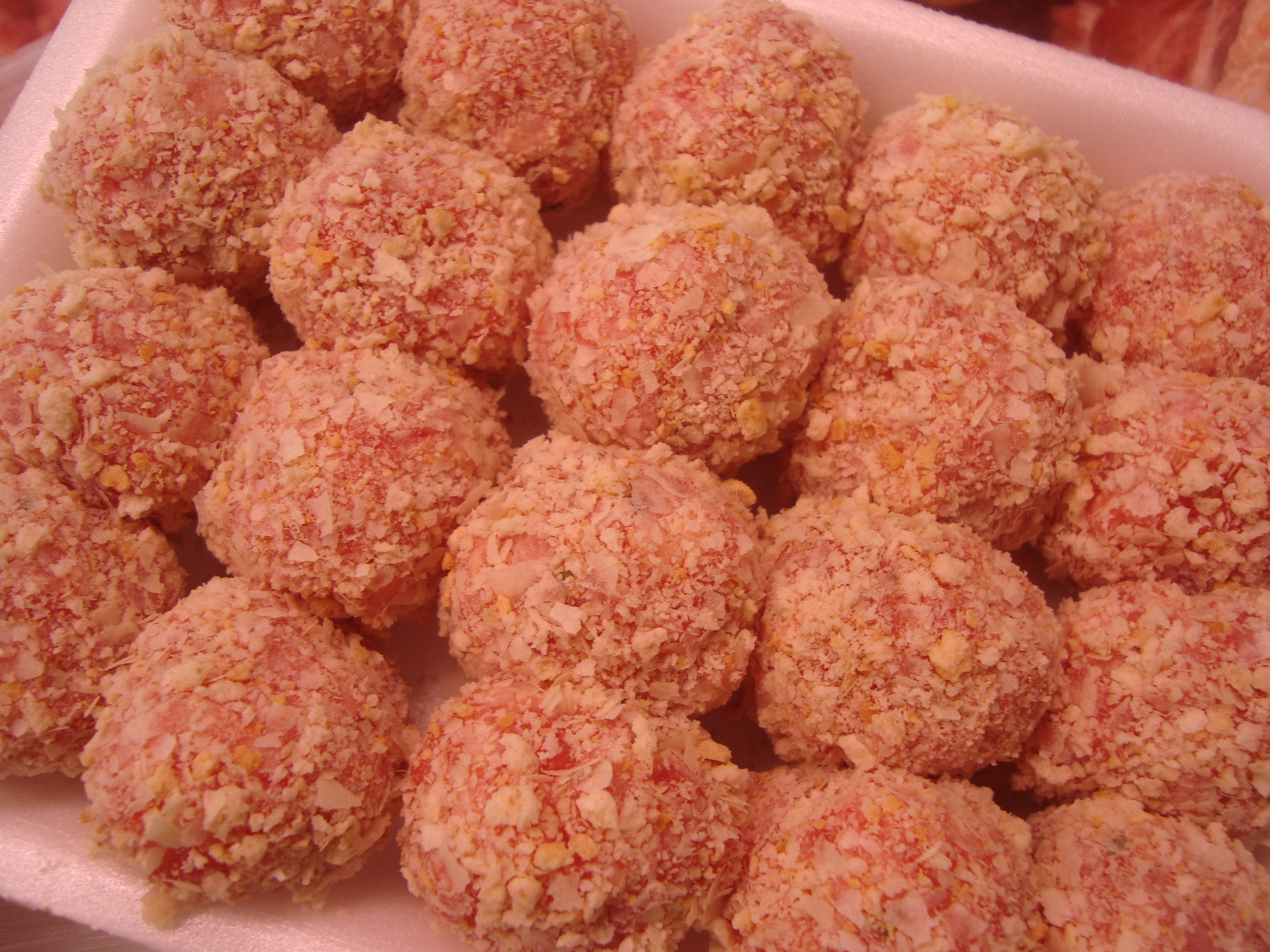 Albóndigas de carne "Prades-Martí" (Torreblanca, Comunidad Valenciana)